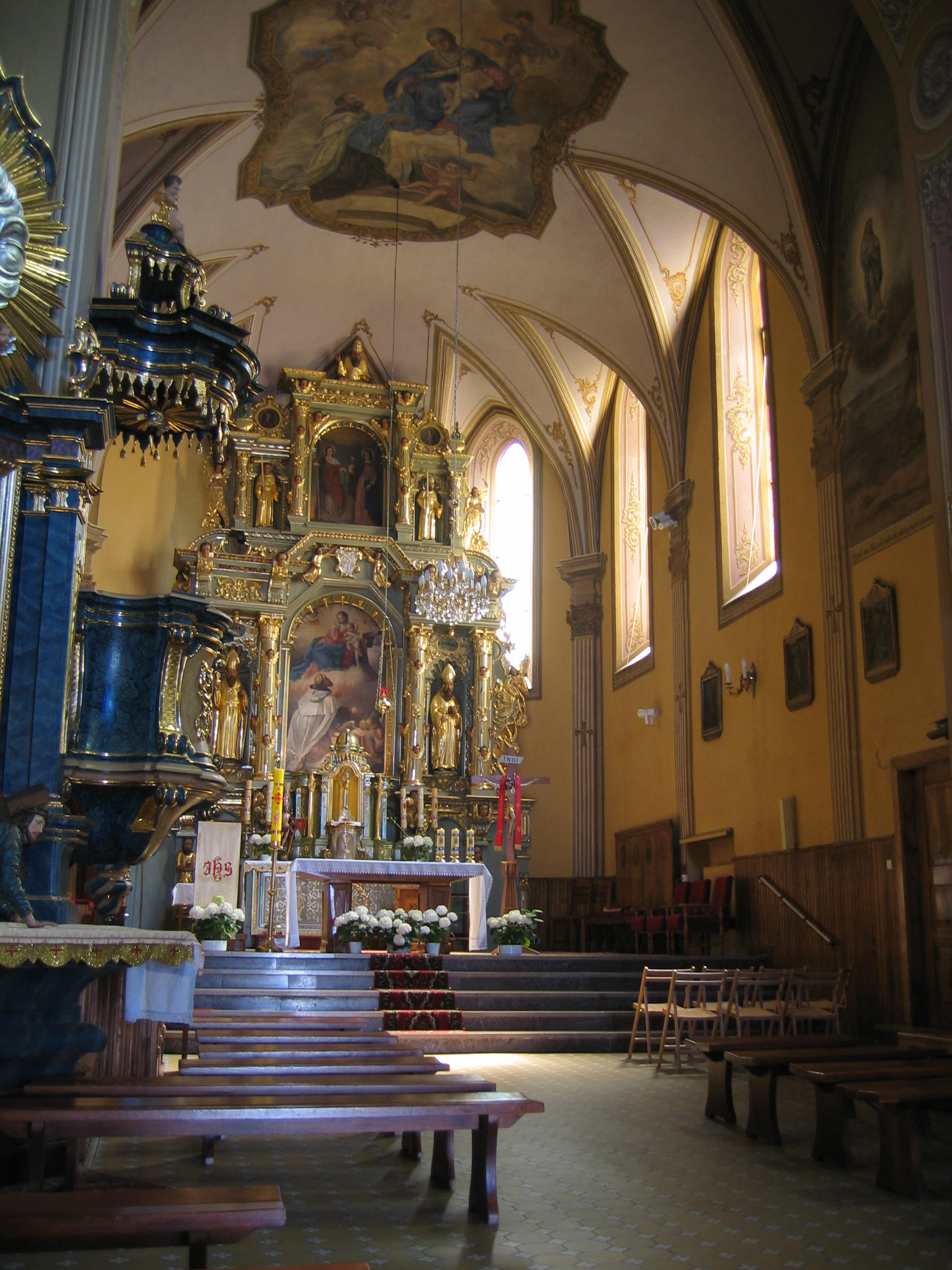 Pilzno - zespół klasztorny karmelitów: kościół św. Katarzyny i Barbary, wnętrze (zabytek nr A-256 z 7.08.1985)